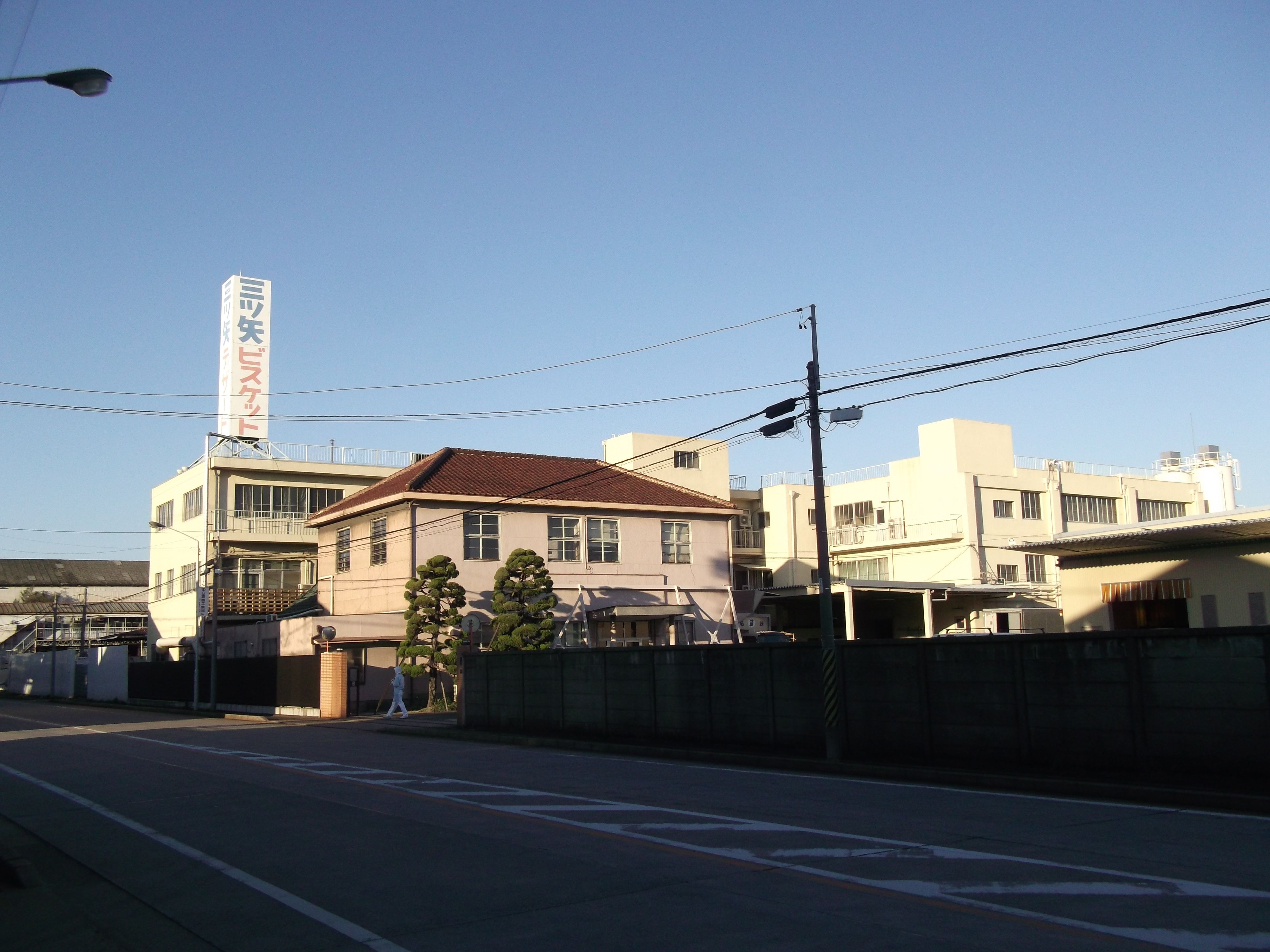 名古屋市中川区富川町の三ツ矢製菓本社を西側公道南側より撮影